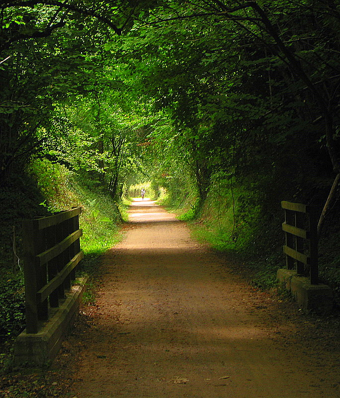 Via verda en el recorregut de l'antic carrilet d'Olot. Por un tunel acogedor y fresco caminamos hacia Olot